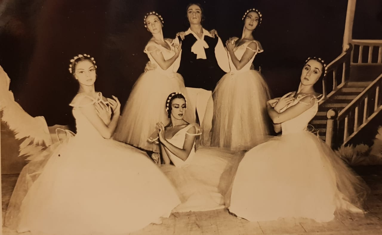 Bailarinos do Teatro Argentino La Plata anos 40/50